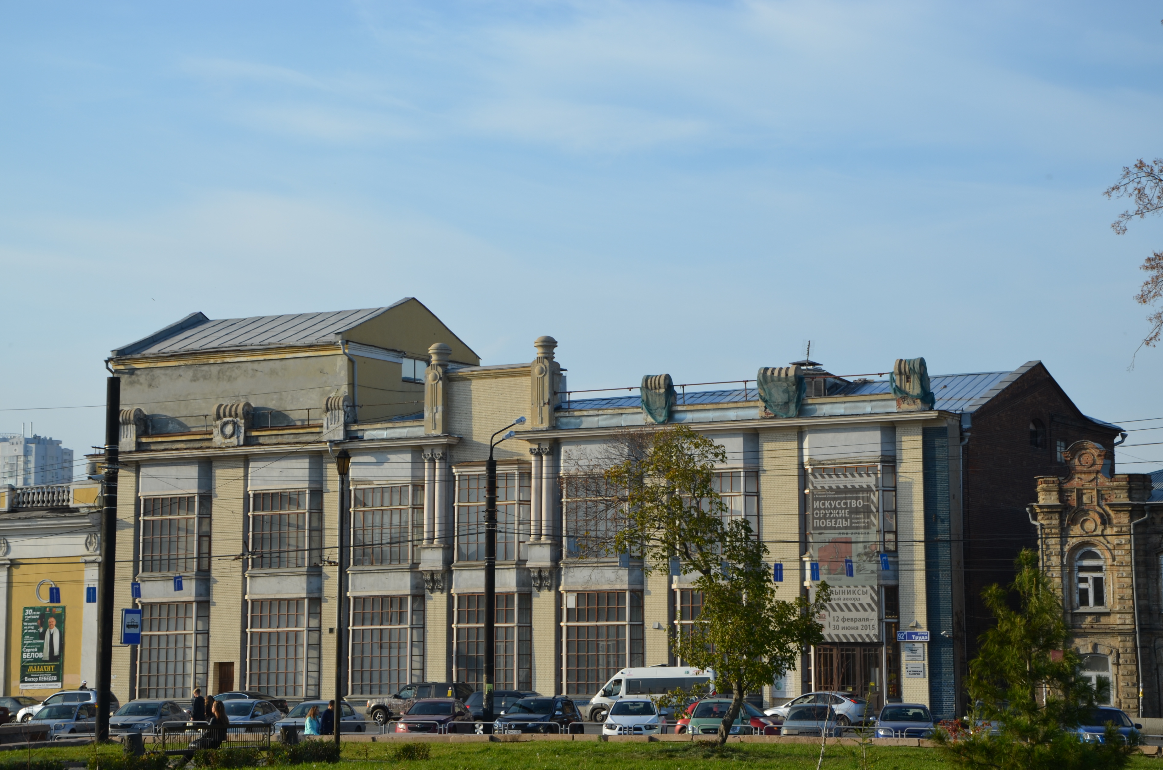 Торговый дом Яушевых (пассаж Яушевых): улица Труда, 92а, Челябинск, Челябинская область